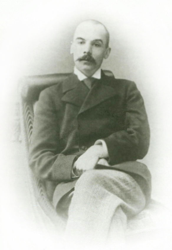 Александр Андреевич Карзинкин (1863—1939) — член московского Нумизматического общества, автор ряда работ о русских средневековых медалях. с 1886 — один из директоров Товарищества Ярославской Большой мануфактуры. Член советов Московского учётного банка, Московского банка, Российского взаимного страхового союза, Музея гигиены и санитарной техники. Один из крупнейших московских домовладельцев.